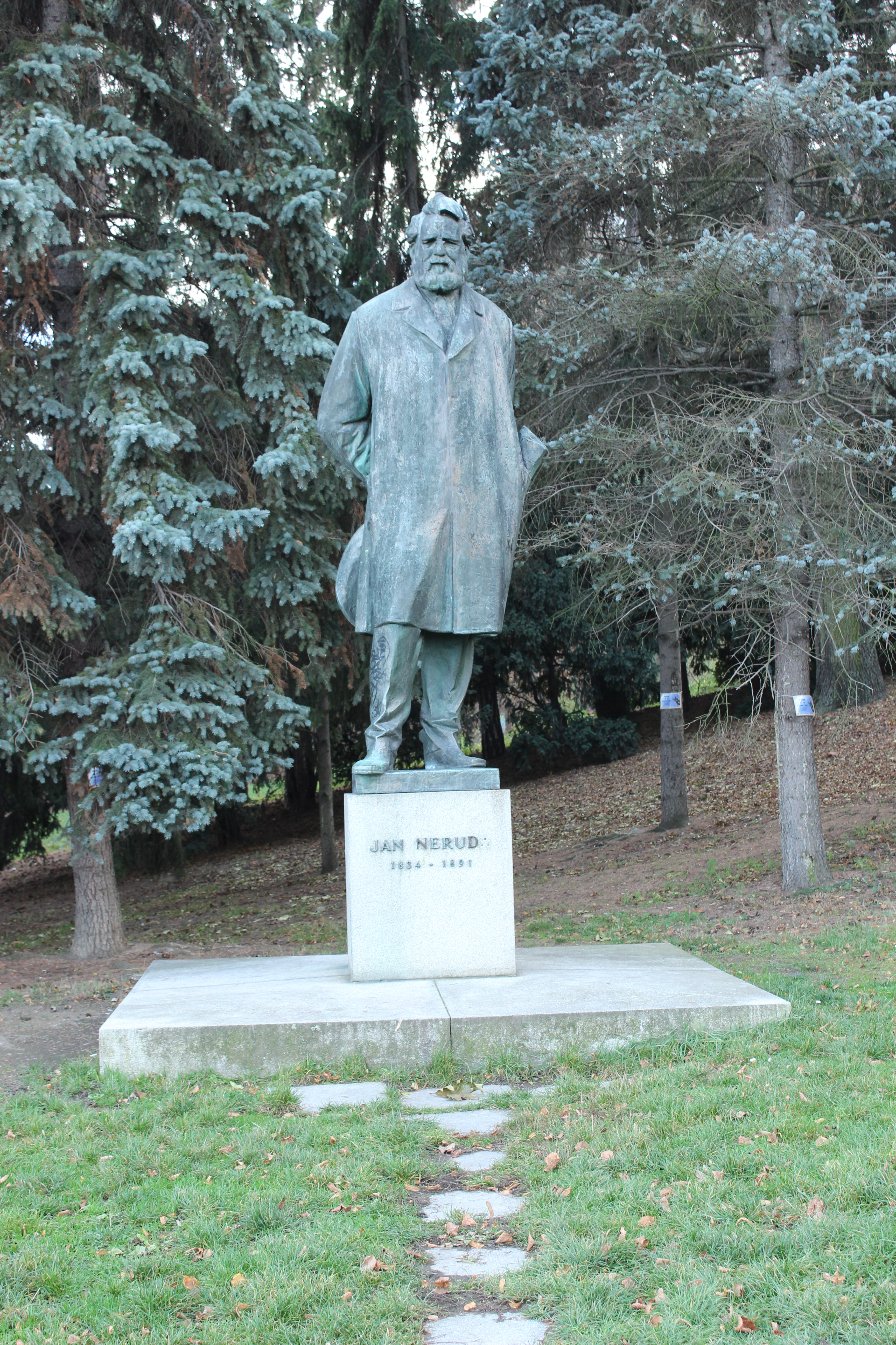 Socha Jana Nerudy na pražském Petříně.